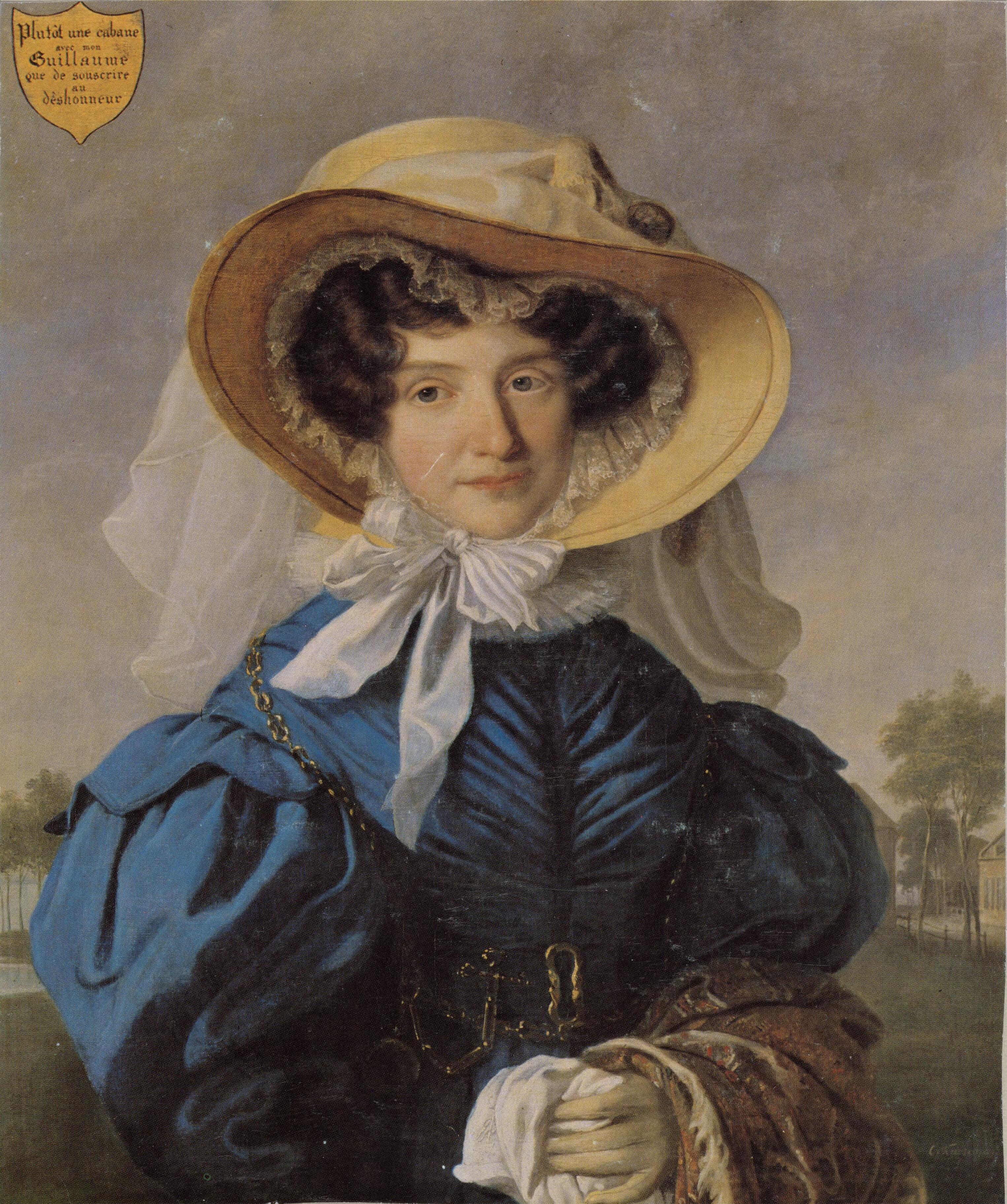 Koningin Anna Paulowna Stichting Historische Verzamelingen van het Huis Oranje-Nassau, Den Haag , inv./cat.nr SC/0445, schilderijen standplaats Paleis Het Loo